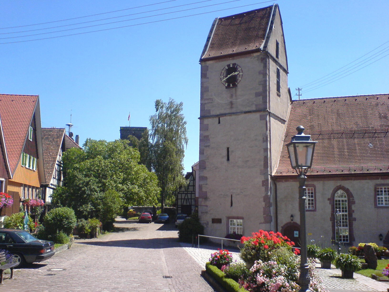 Das Photo zeigt Zavelstein (Württ.) mit Kirche und Burg